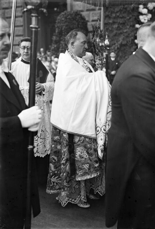 Die feierliche Fronleichnam-Prozession an der Hedwigskirche in Berlin! Die feierliche Messe zelibrierte der Weihbischof von Berlin Dr. Schreiben. Unter den prominenten Teilnehmern befanden sich der Reichskanzler Dr. Brüning, Reichs-Innenminister Dr. Wirth, Reichsverkehrsminister Dr. Guerard, Reichsarbeitsminister Dr. Steegerwald, Postminister Schätzel. Der neue Weihbischof von Berlin Dr. Schreiber im Fronleichnamszuge mit dem Allerheiligsten.